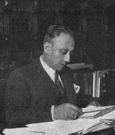 Antonio Taboada Tundidor, fotografía en Vida Gallega 1936